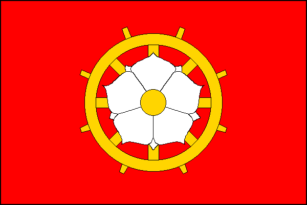 vlajka, Oprostovice,okres Přerov